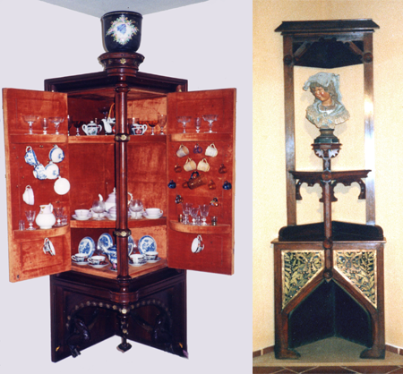 Fotografía de los muebles diseñados por Antonio Gaudí para la casa que la familia Vicens tenía en Alella, donde el arquitecto proyectó una capilla con el retablo de la Crucifixión. El primero es un armario esquinero colgante de madera e incrustaciones de metal dorado cuyas puertas tienen estantes en su cara interior,. El otro es una chimenea rinconera de madera y metal actualmente expuesta en la Casa museo Gaudí del Park Güell, en la que pueden verse las iniciales M.V. de Manuel Vicens escritas sobre plancha metálica.